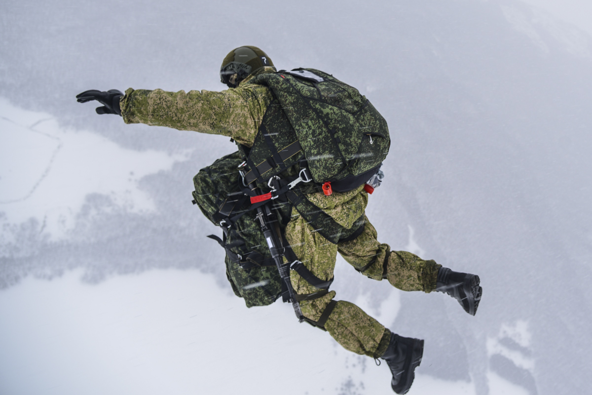 Первое совместное российско-белорусское учение 31-й отдельной гвардейской десантно-штурмовой бригады ВДВ ВС РФ и ССО ВС Республики Беларусь по миротворческой тематике в Ульяновской области.